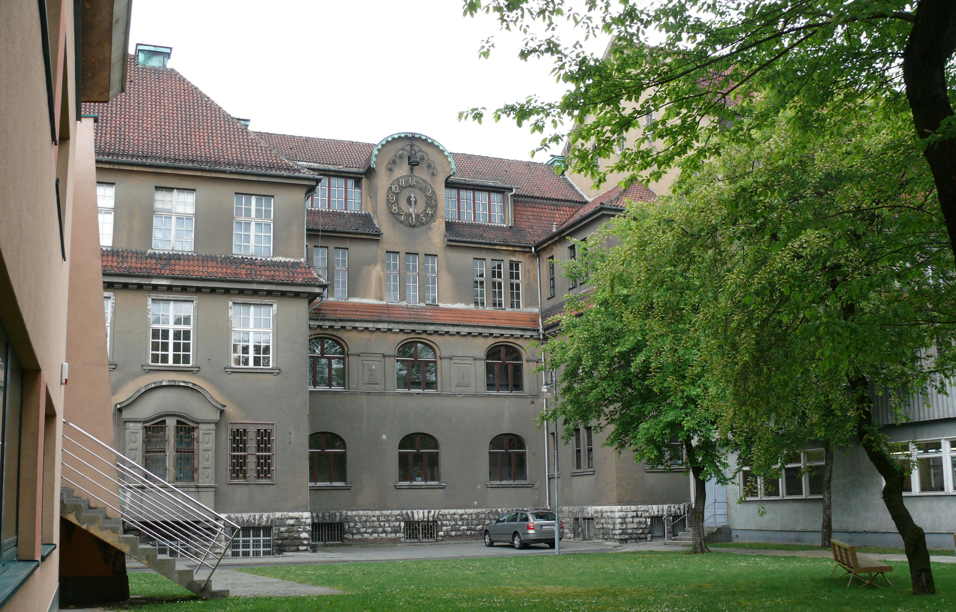 Wydział Budownictwa Politechniki Opolskiej; tył budynku